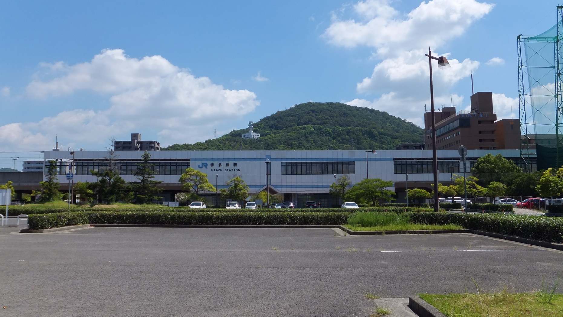 香川県綾歌郡宇多津町 宇多津駅 南口